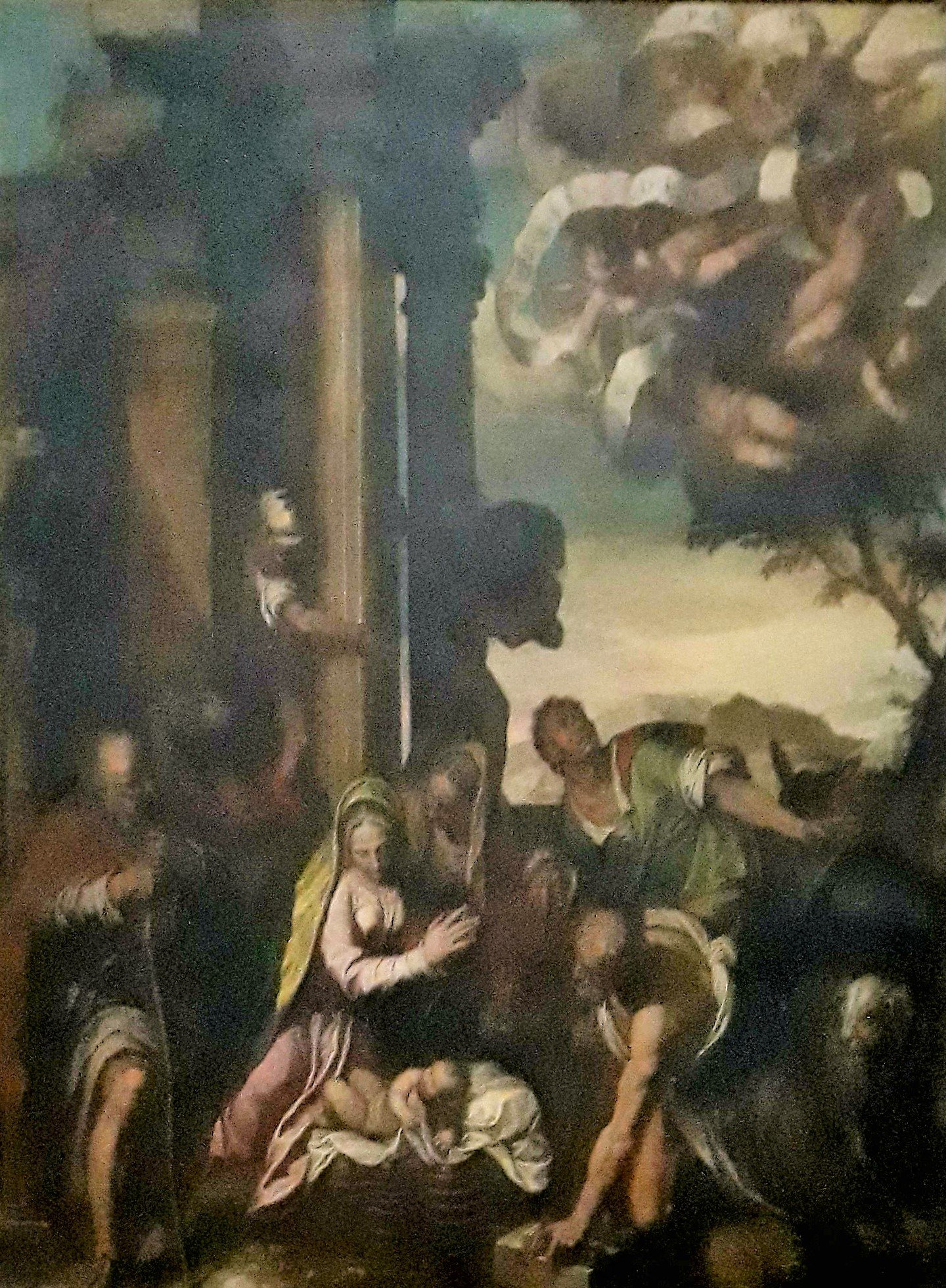 Adorazione dei Pastori - di Paolo Farinati - 1589. Chiesa di Madonna di Campagna a Verona